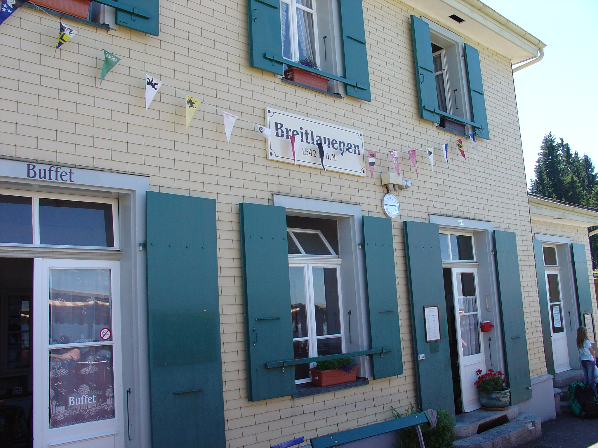 Schynige Platte-Bahn, Breitlauenen station